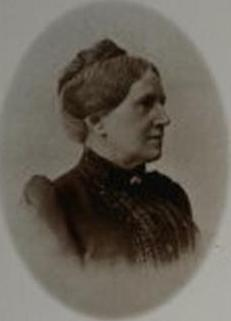 Henriette Schrader-Breymann, alte Fotografie ca. 1895